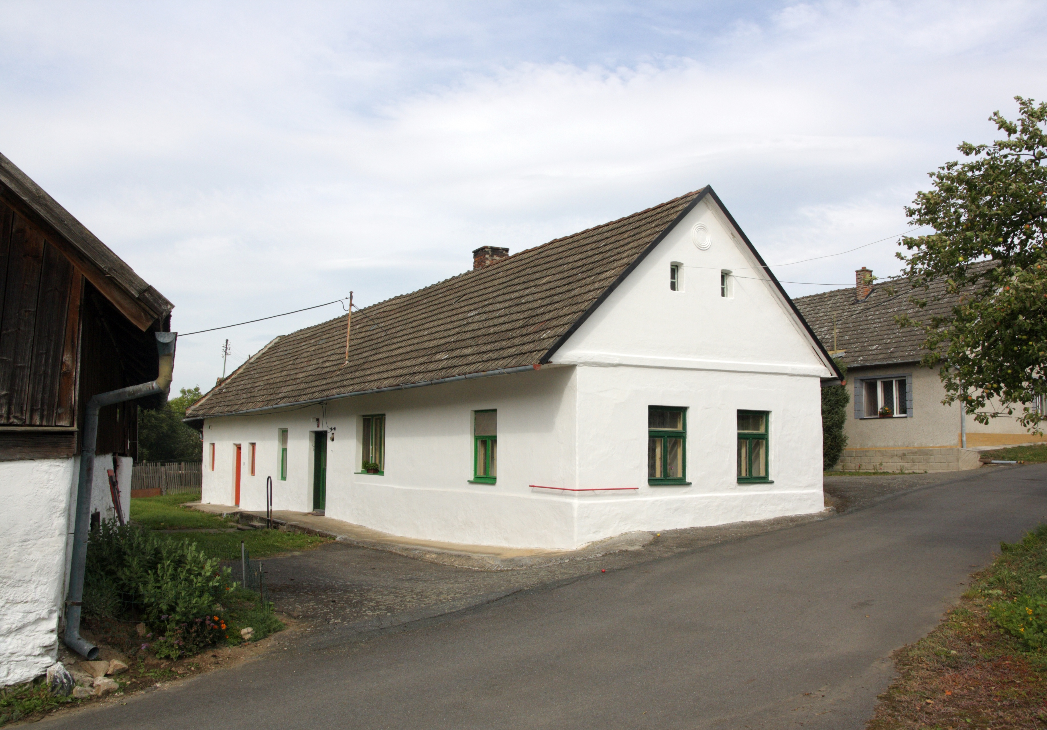 Nivy (Střítež) - stavení čp. 50.